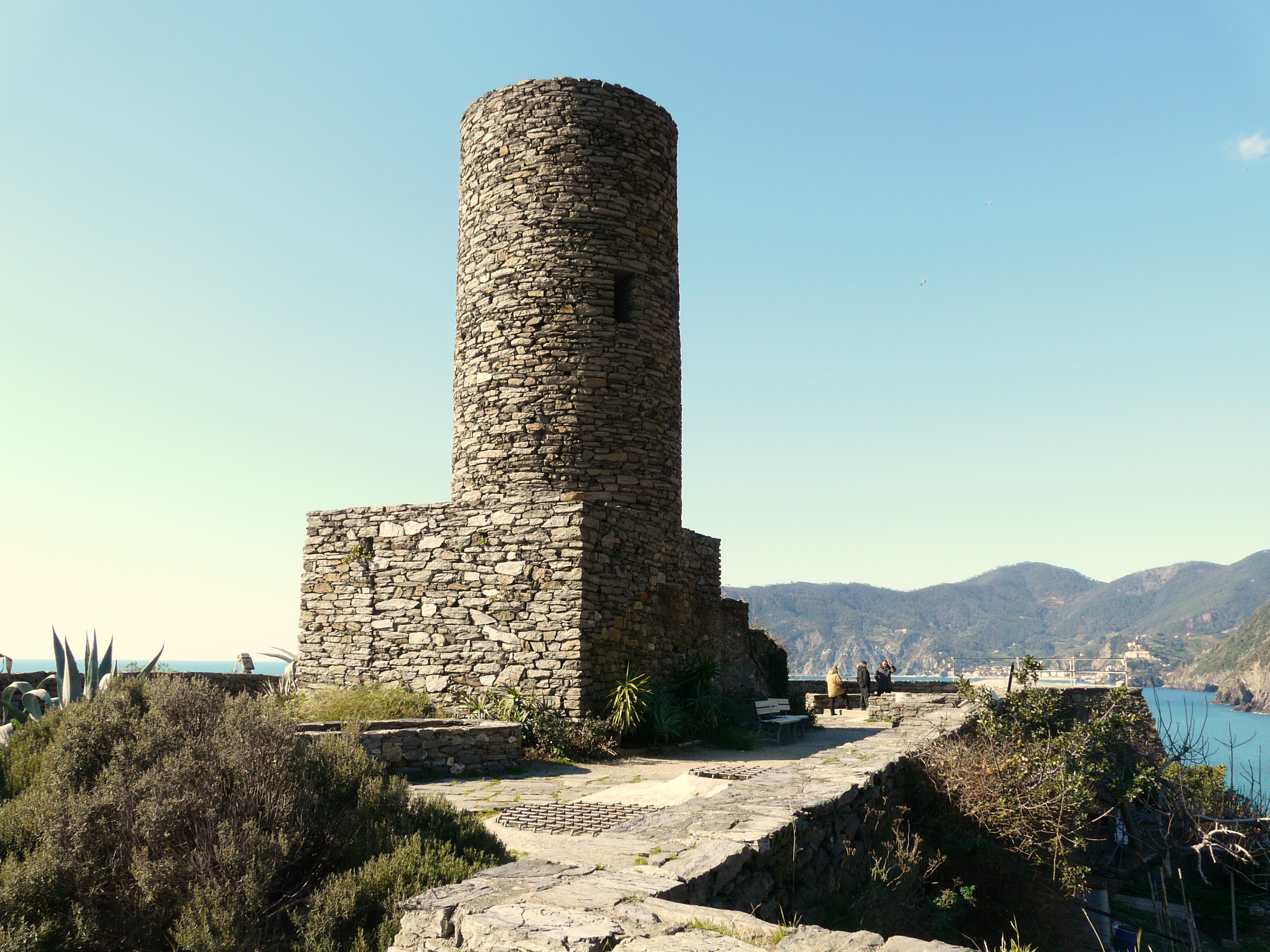 Castello di Vernazza, Cinque Terre, La Spezia, Liguria, Italia